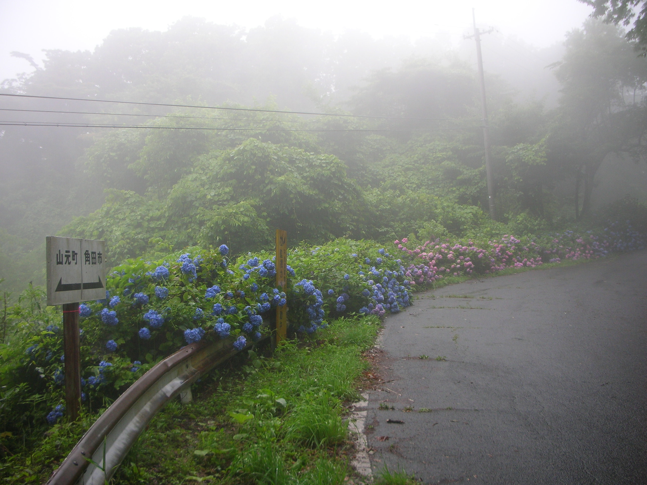 四方山・角田市・山元町